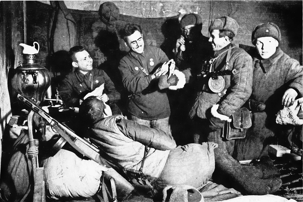 Бойцы 13-й гвардейской стрелковой дивизии в Сталинграде в часы отдыха. Декабрь 1942 г